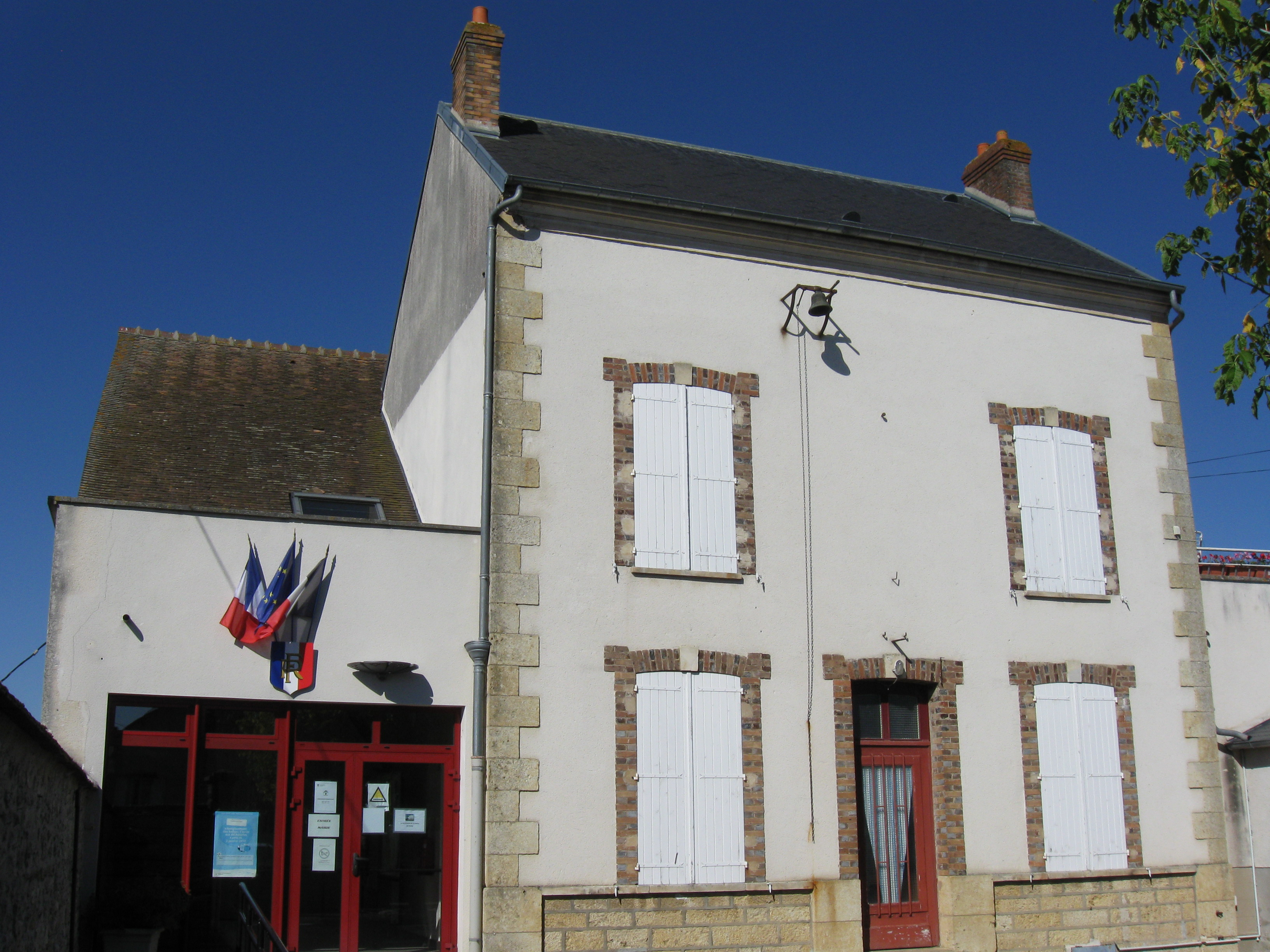 Mairie d'Ichy. (Seine-et-Marne, région Île-de-France).